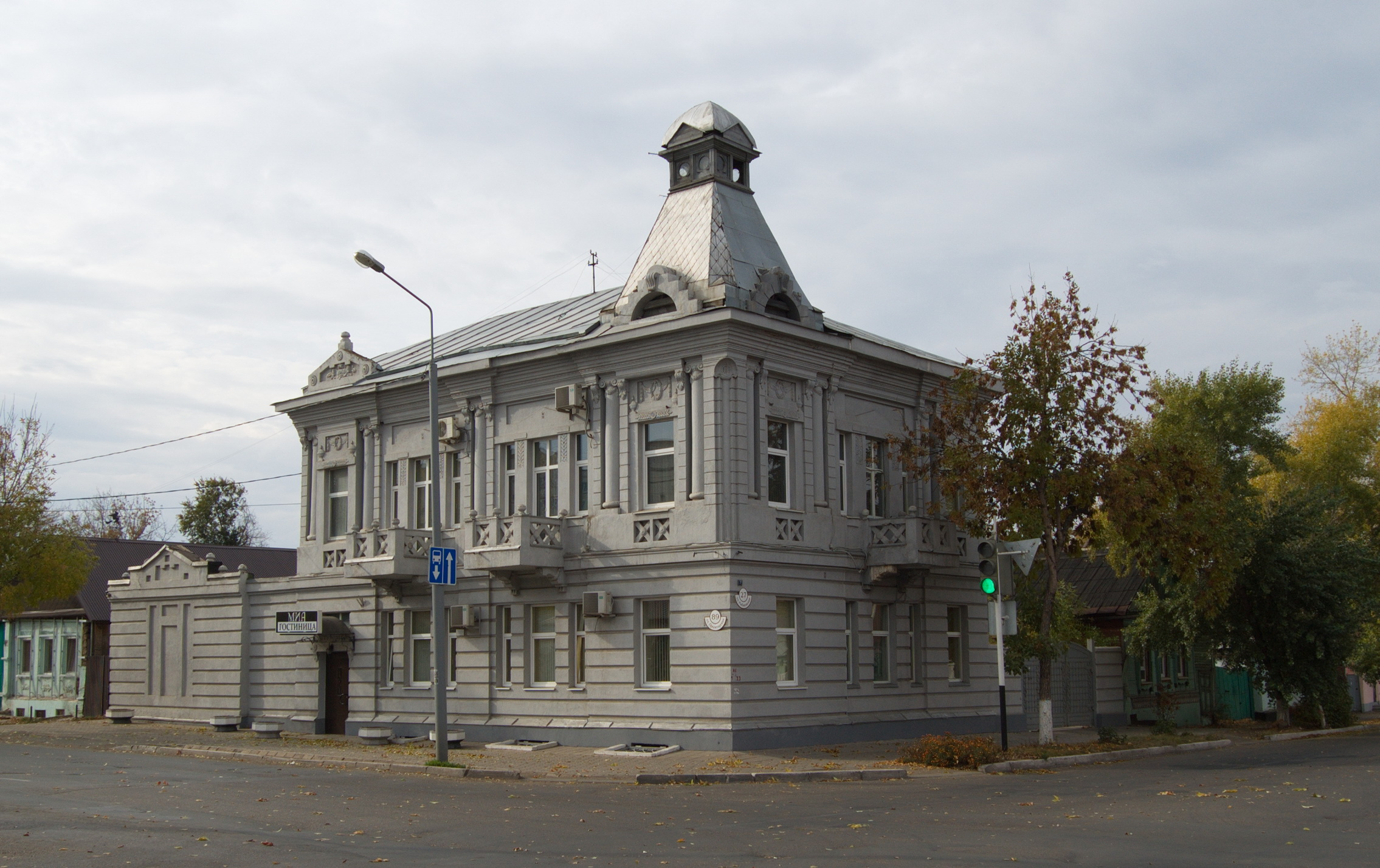 Особняк Хусаинова (Оренбургская область, Оренбург, Пролетарская улица, 89, Рыбаковская улица, 27)